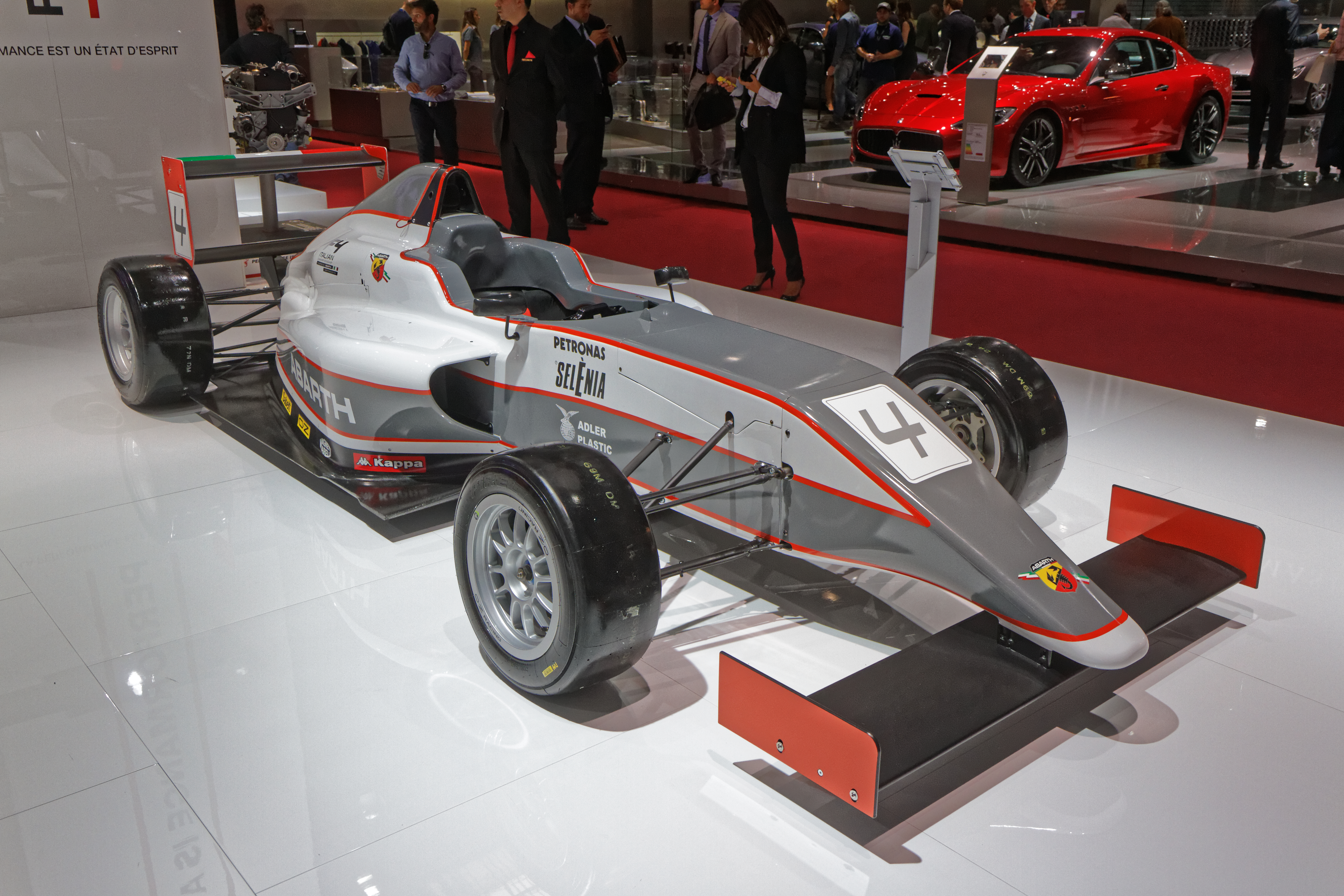 Une Abarth Tatuus F4 T014 présentée lors du mondial de l'automobile de Paris 2014.